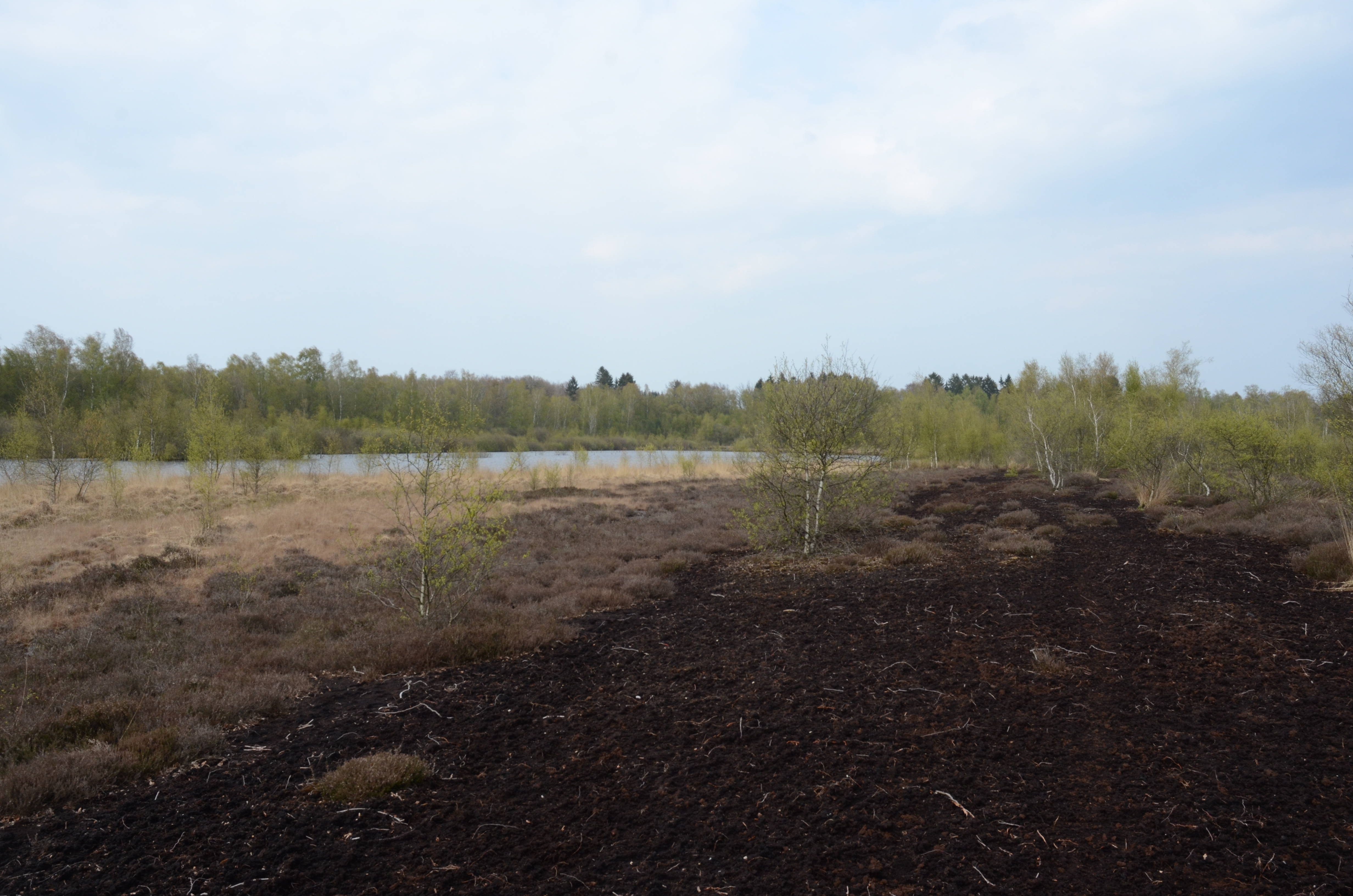 Wasserflächen und Torfbänke im Tarbeker Moor